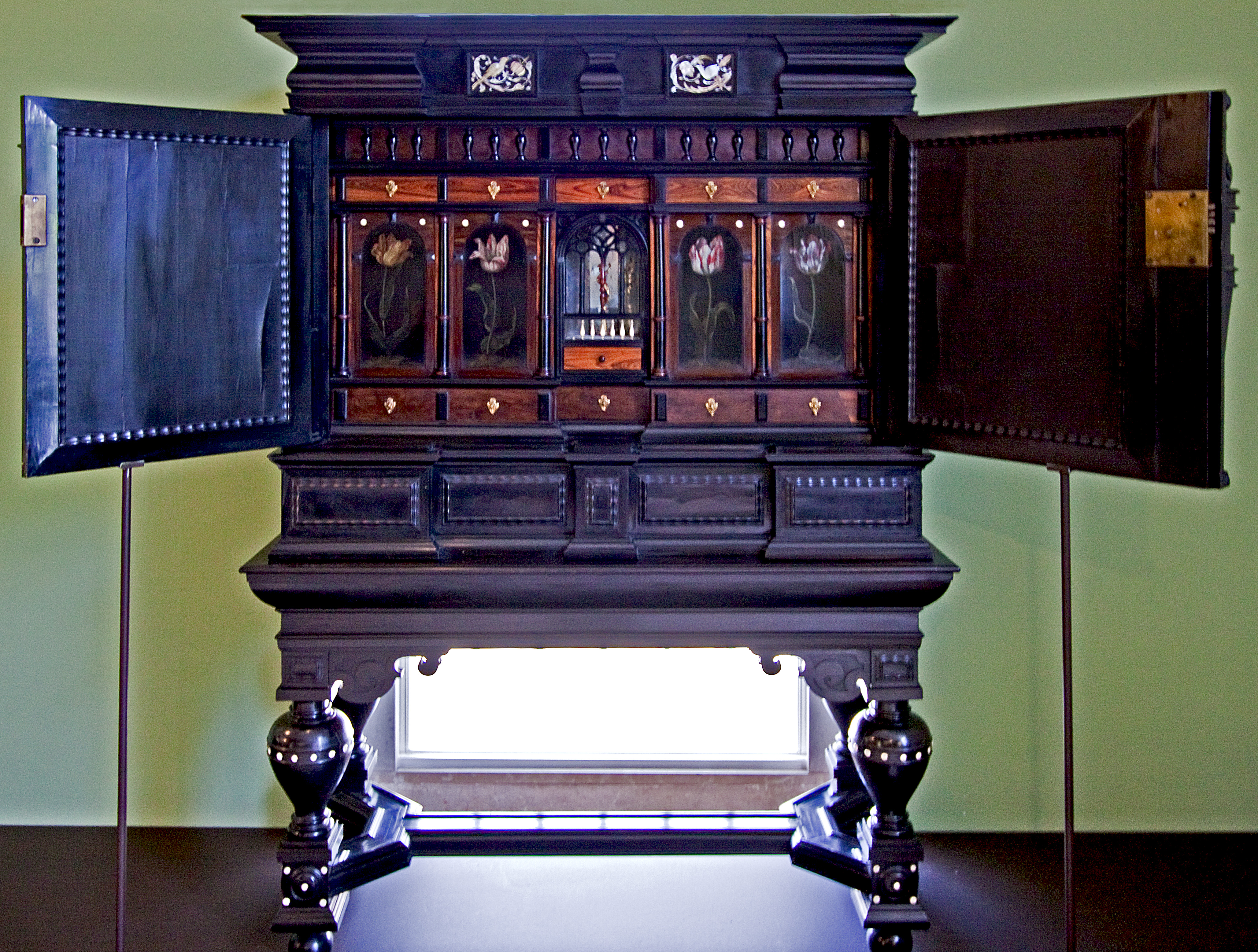 Kunst (tulpen)kabinet, Herman Doomer (Toegepaste kunst en Design, zaal 44) Country: Netherlands City: Rotterdam Location: Museum Boymans van Beuningen Artist: Herman Doomer Name: Kunst (tulpen) kabinet, 1635-1650